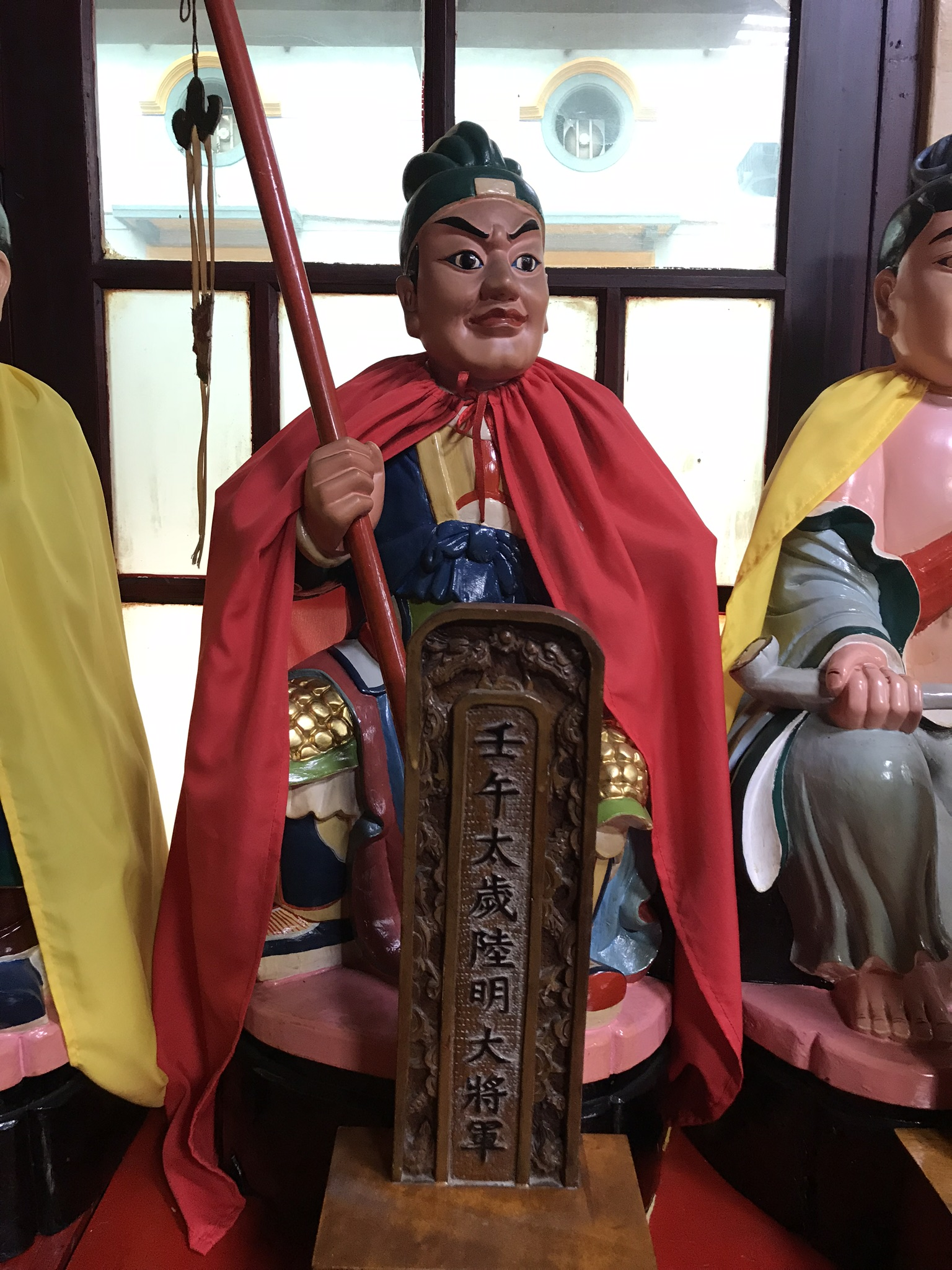 壬午太歲陸明大將軍神像